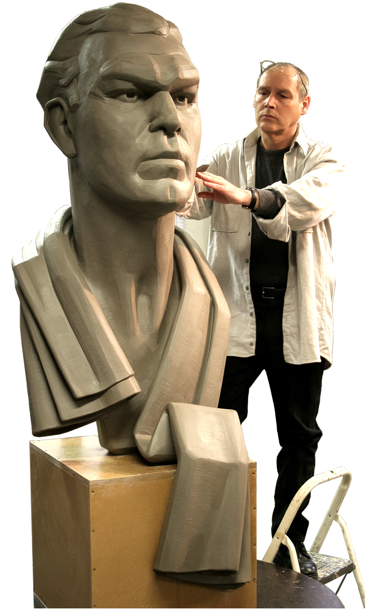 Das Max-Schmeling-Denkmal: Bildhauer Carsten Eggers hat den Jahrhundert-Sportler für dessen Wahlheimat Hollenstedt verewigt